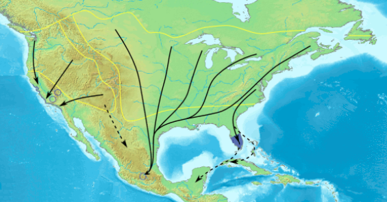 Wanderung und Verbreitung des Monarchfalters (Danaus plexippus) in Nordamerika (Animation)